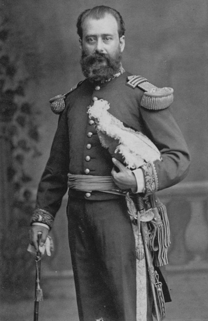 El Gral. José María Sarasti, miembro del pentavirato que derrocó al presidente ecuatoriano Ignacio de Veintemilla en 1883. La fotografía corresponde precisamente al año 1883.